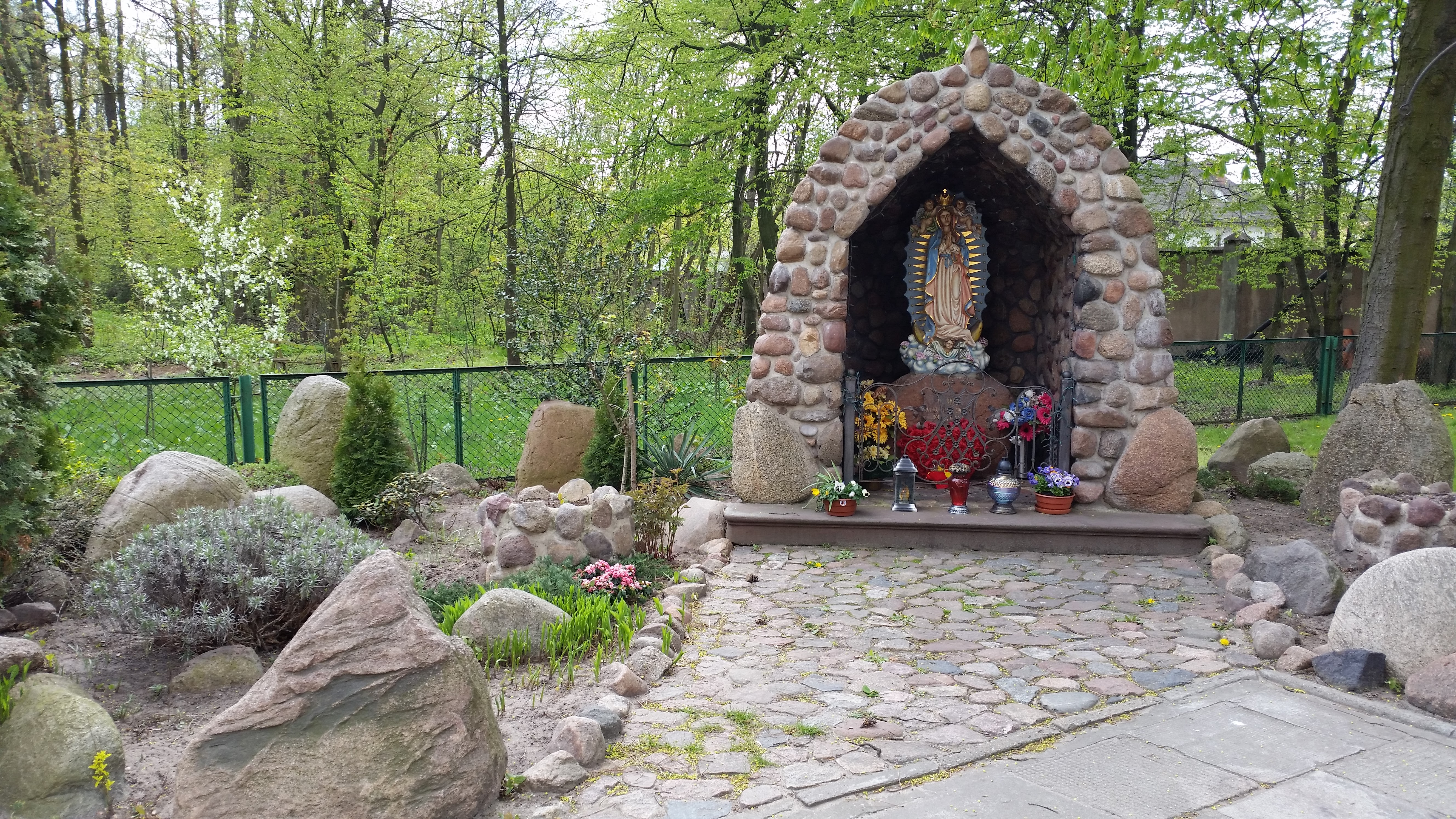 Kapliczka przy Kościele Przemienienia Pańskiego w Pruszkowie